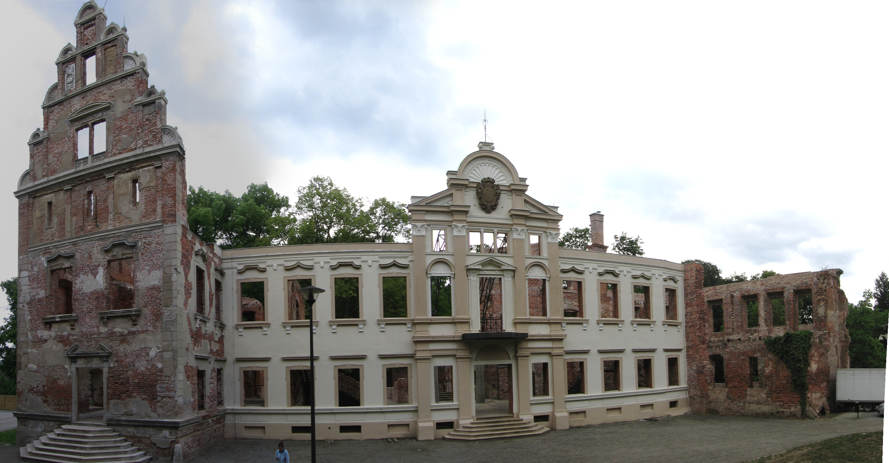 ruiny pałacu Hatzfeldów w Żmigrodzie (woj. dolnośląskie)